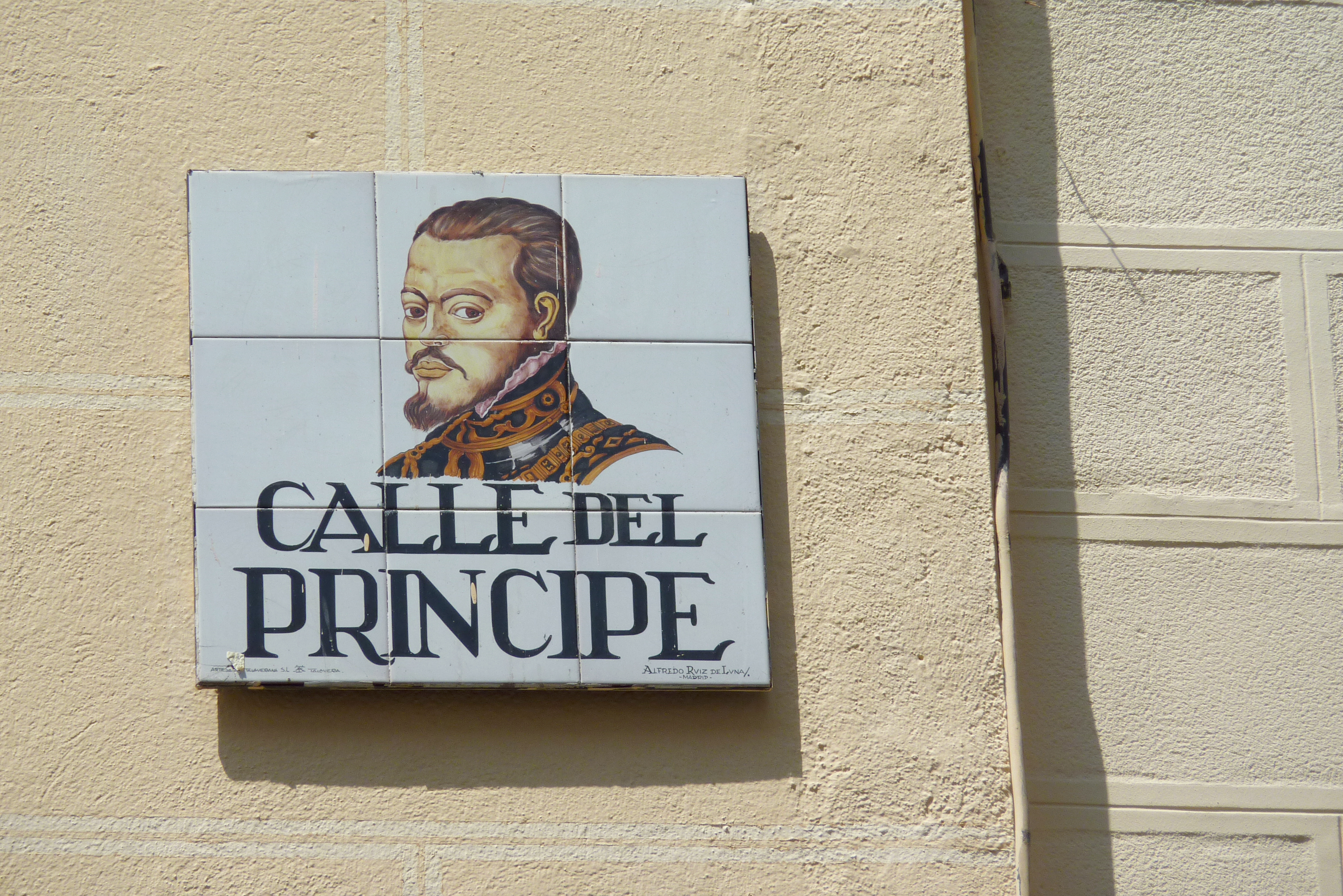 Straßenschild: Calle del Príncipe, in Madrid (Spanien), mit Signatur von Alfredo Ruiz de Luna González und der Keramikmanufaktur Artesanía Talaverana S.L. in Talavera de la Reina